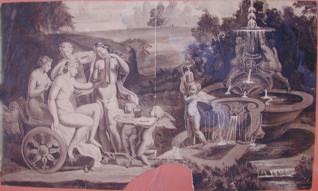 Dessin d'Antoine LOIGNON, sculpteur Valenciennois du milieu du 19ème siècle.